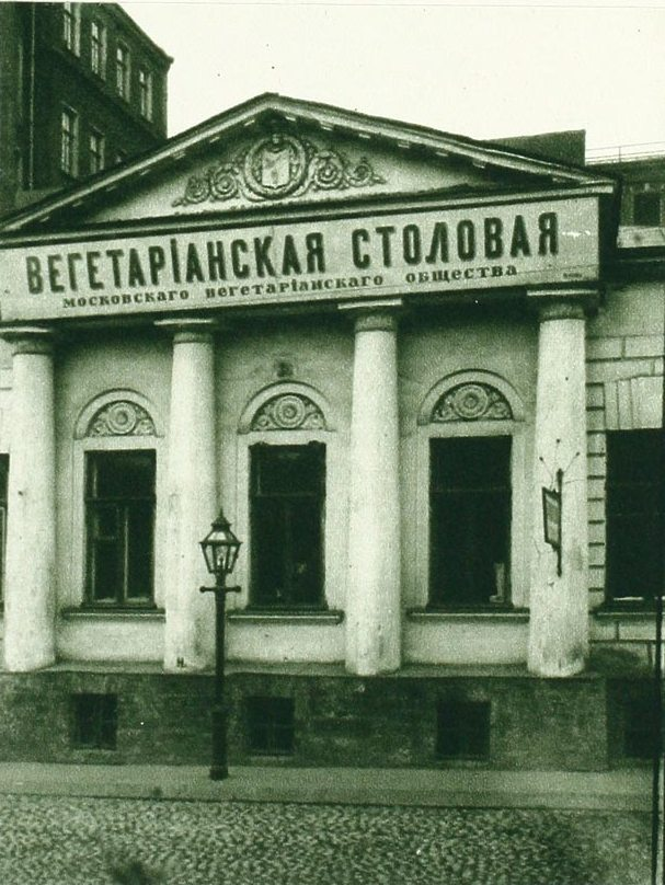 Московская вегетарианская столовая. Никитский бульвар, на месте дома 15 (также дореволюционного, то есть дом со столовой доживает последние свои годы). Слева видна часть сохранившегося дома 13.